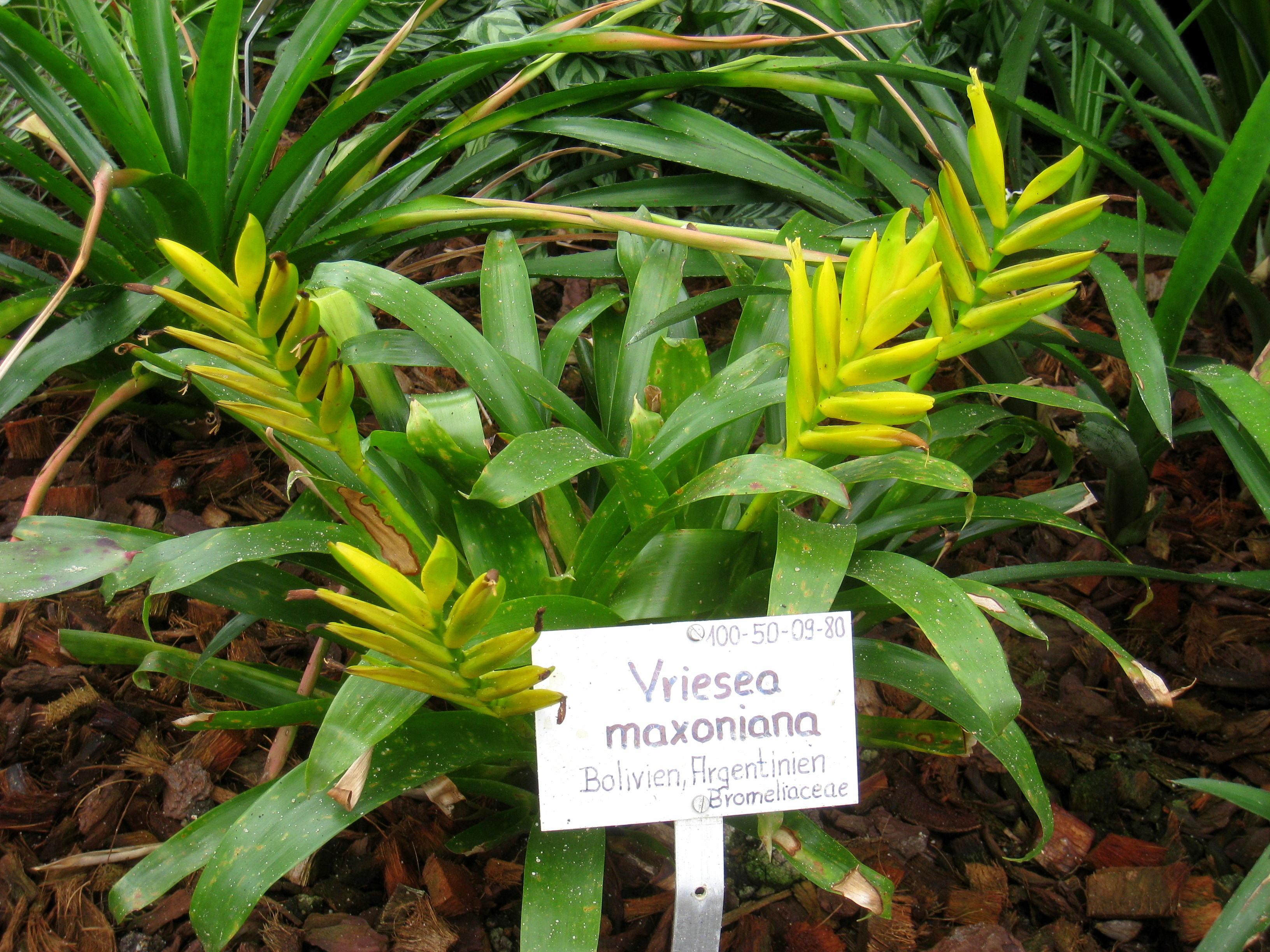 Vriesea maxoniana specimen in the Botanischer Garten, Berlin-Dahlem (Berlin Botanical Garden), Berlin, Germany.